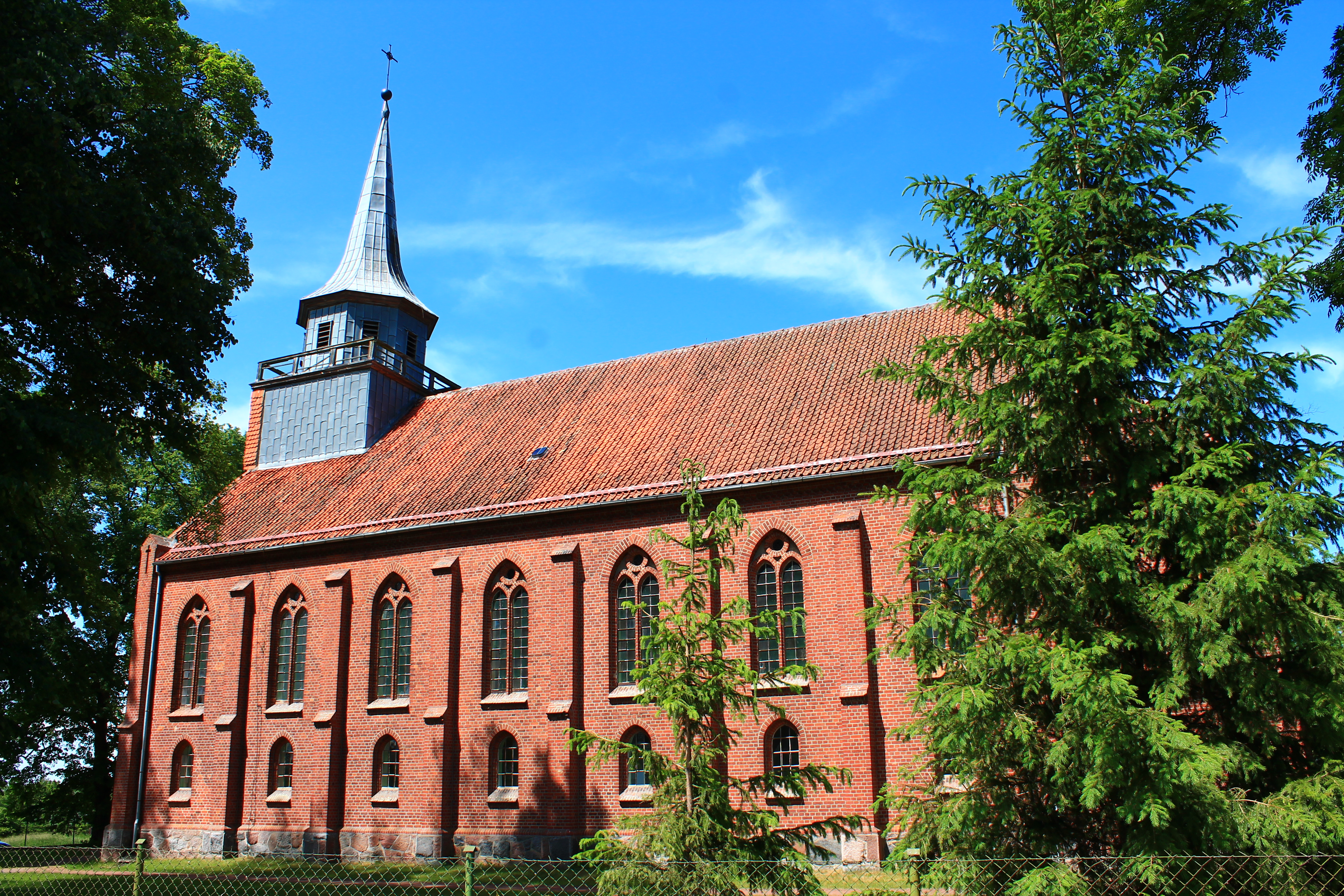 Szymonka, kościół ewangelicki, ob. rzym.-kat. par. pw. Wniebowzięcia NMP, 2 poł. XVI, 1874-1877, 1920